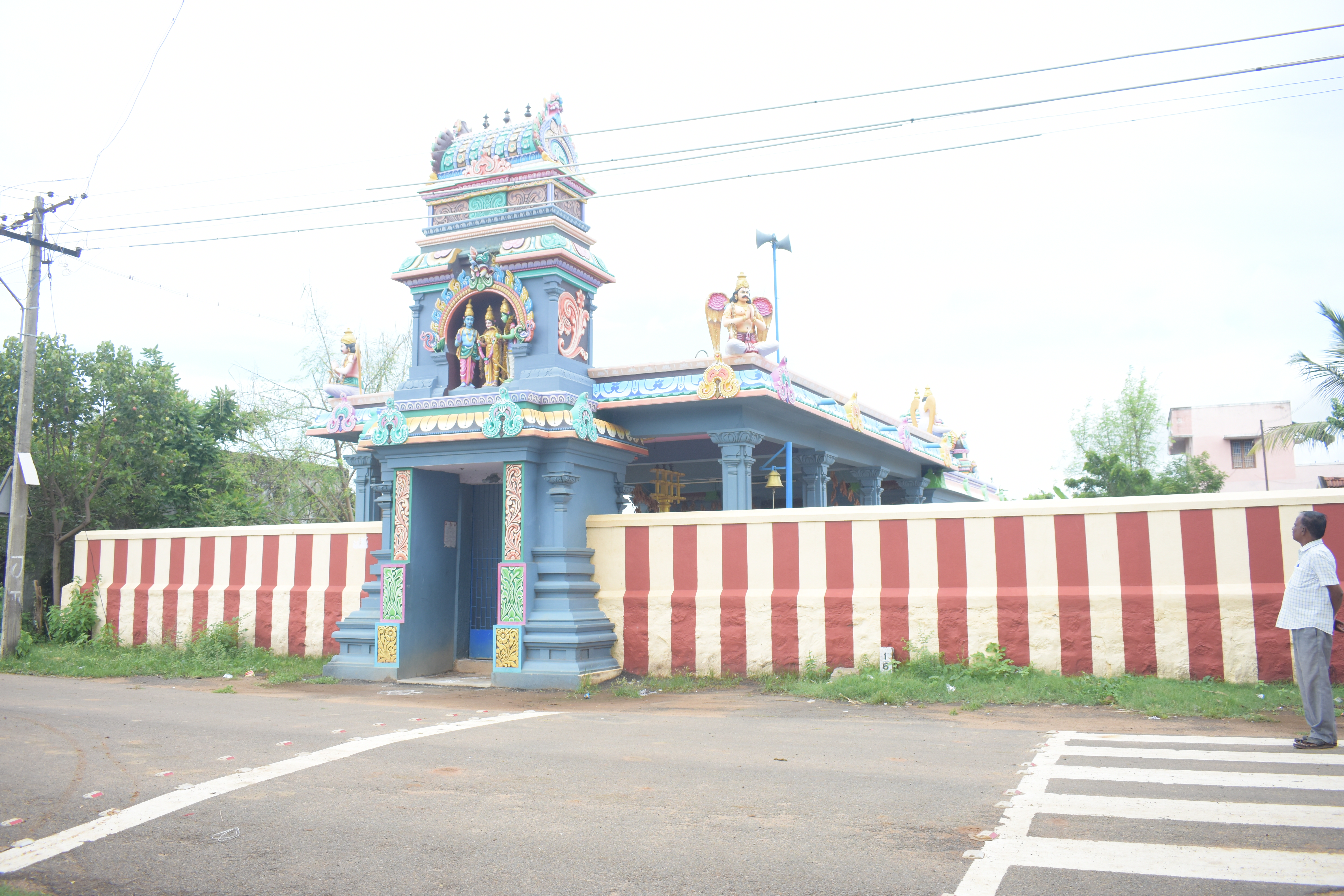 பாதூர் திரௌபதியம்மன் கோயில்